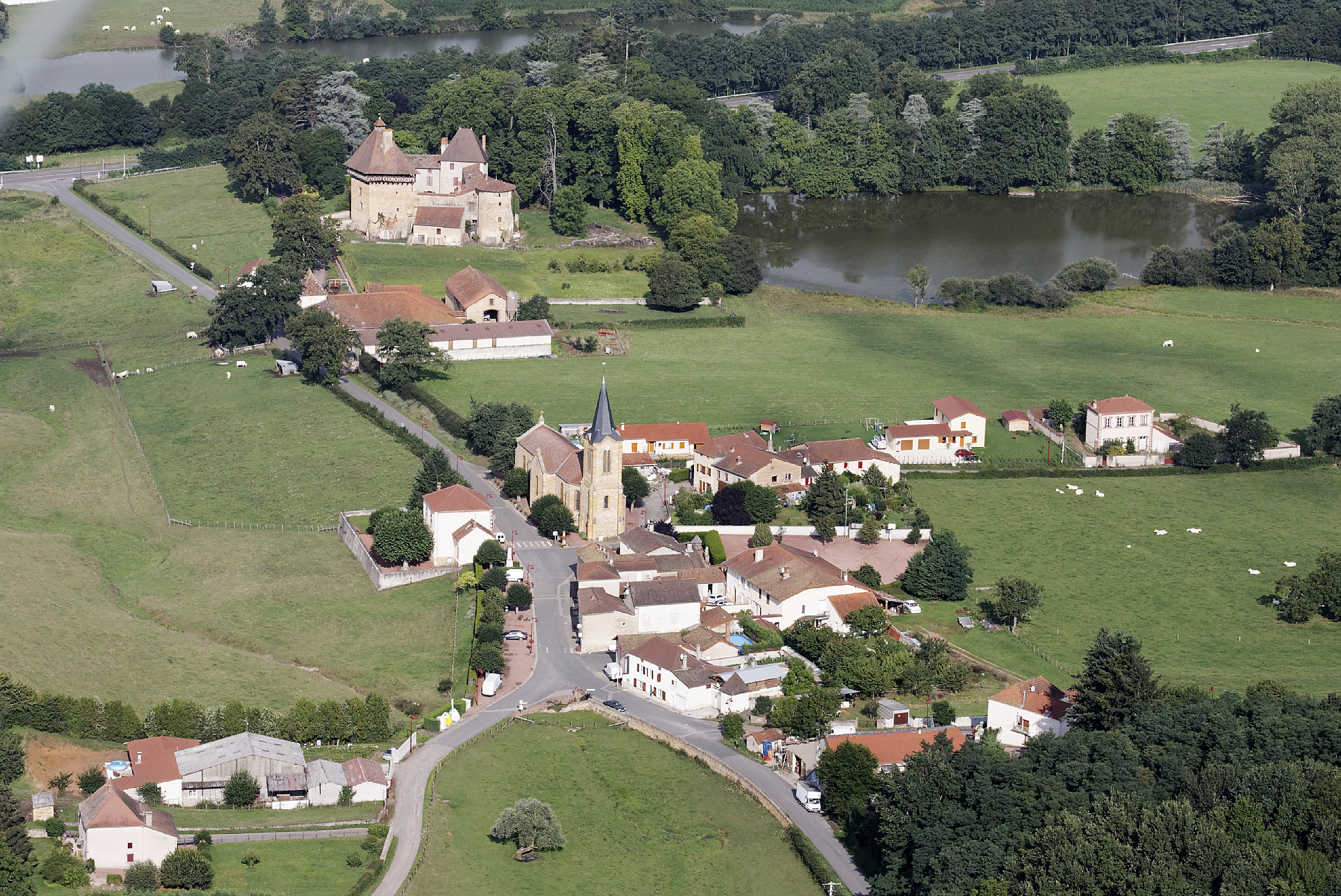 Le Bourg et le Château de St Pierre